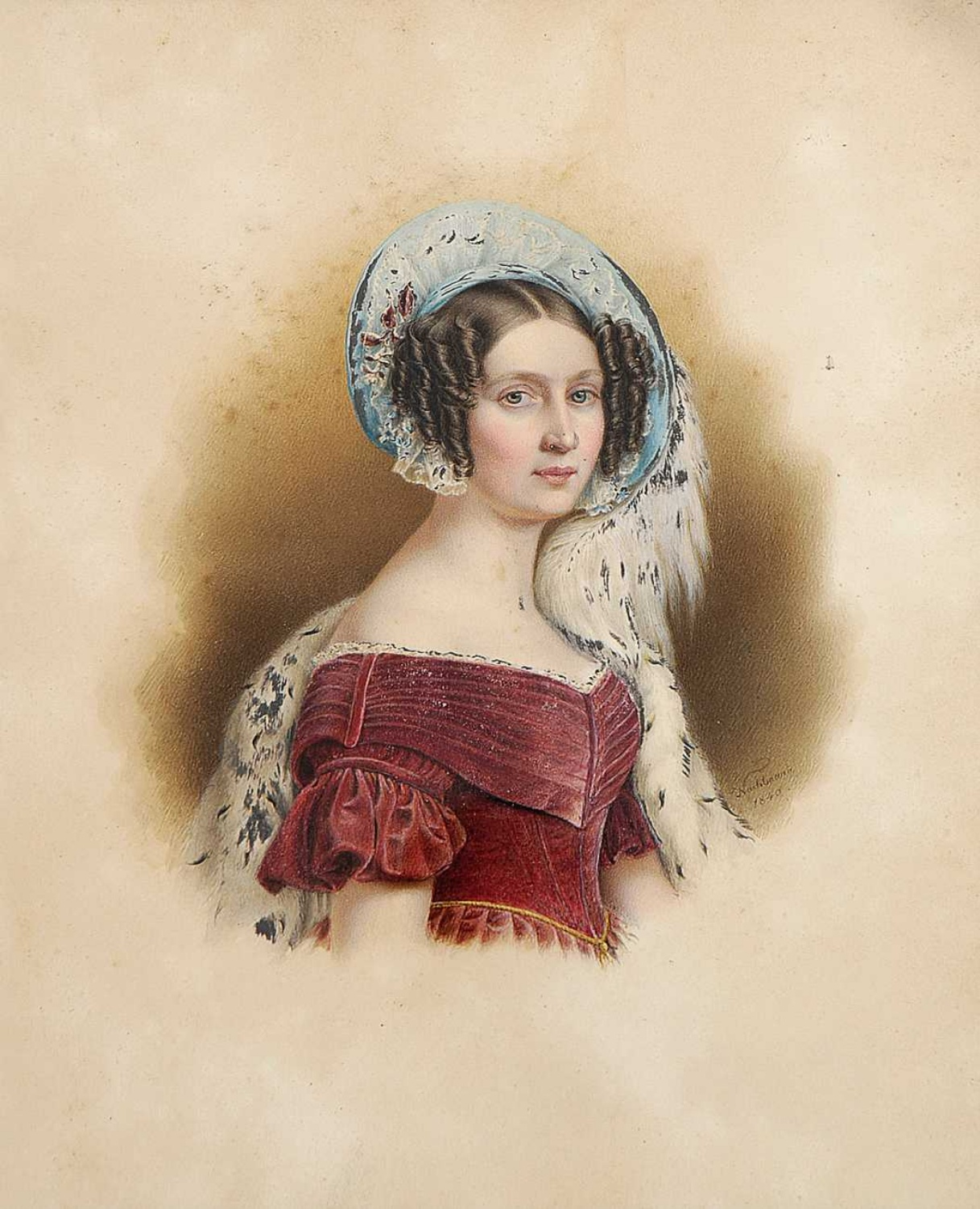 Königin Therese von Bayern, Aquarell und Deckfarben, 23 x 18,7 cm.